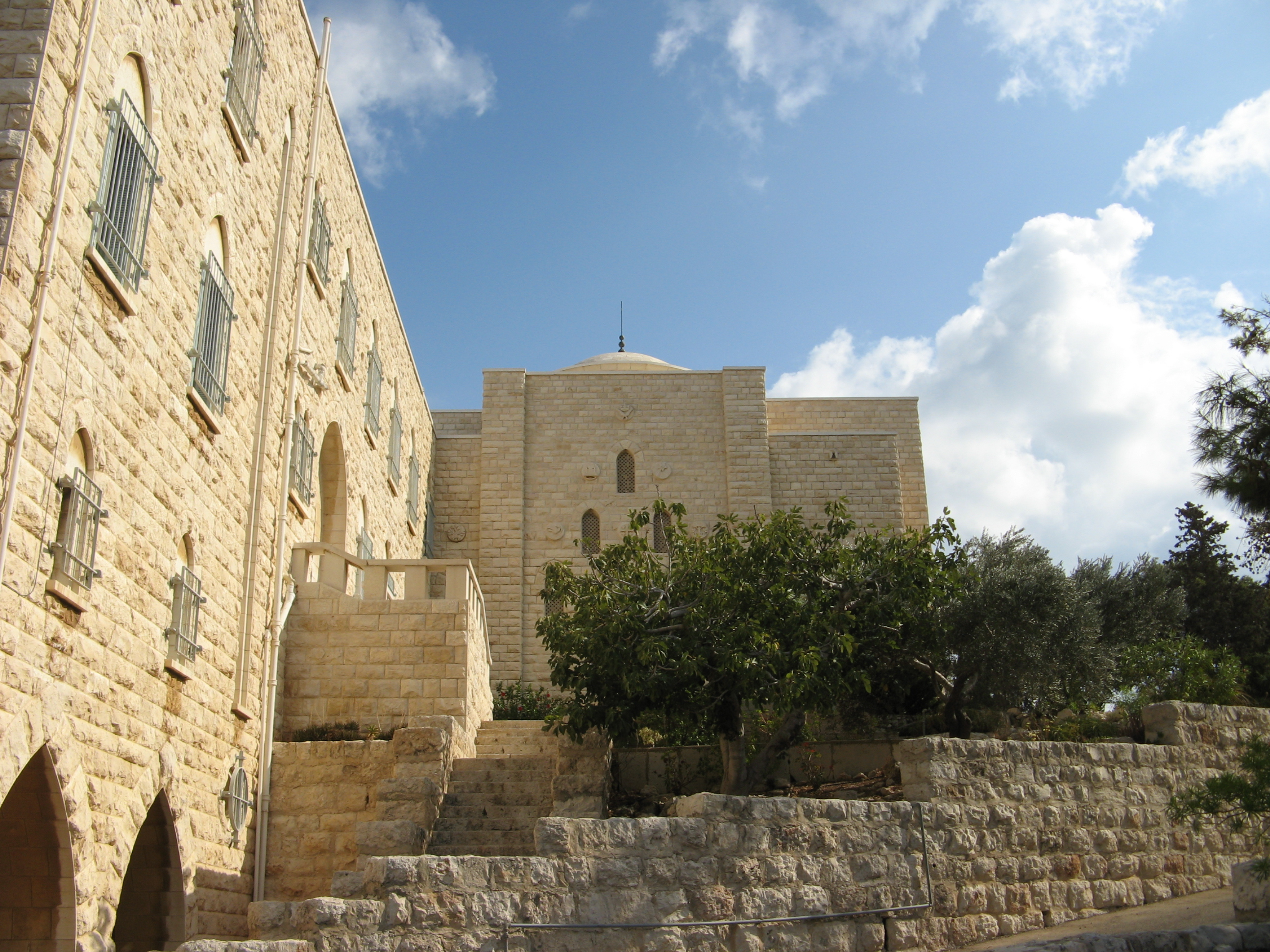 מנזר גבירתנו של הכרמל